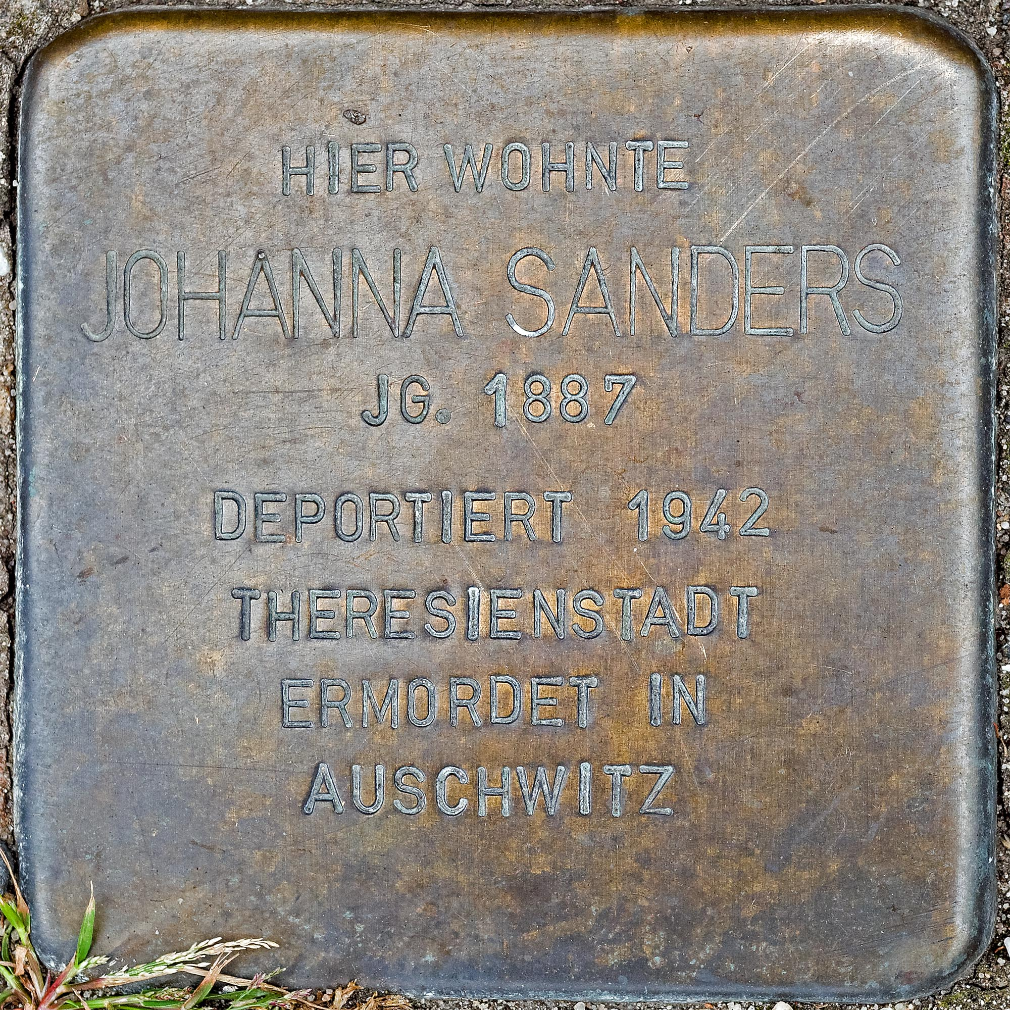 Stolperstein Sanders, Johanna